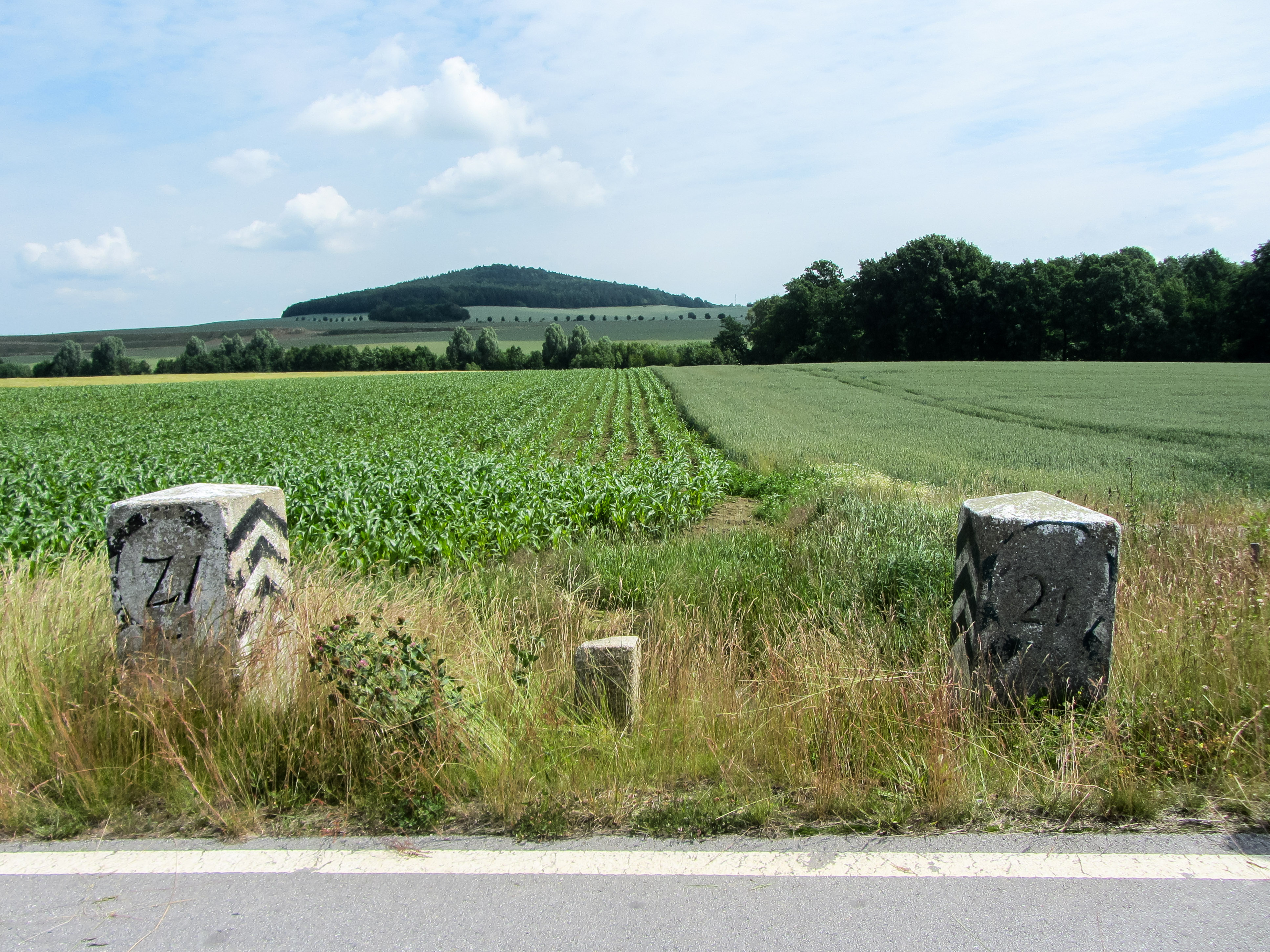 Grenzstein Nr. 21 Historische Landesgrenze Königreich Sachsen Königreich Preußen 1815 (Wiener Kongress)